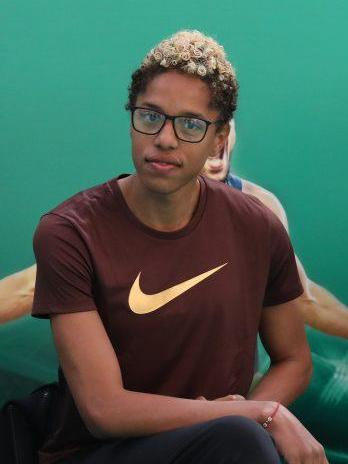 El Meeting Internacional de Atletismo Indoor Villa de Madrid 2019 se celebrará mañana viernes 8 de febrero, de 19.00 a 22.00 horas, en la pista cubierta del Centro Deportivo Municipal Gallur (C/ Gallur, 2), en el distrito de Latina, y convocará a los mejores atletas del mundo en las categorías masculina y femenina.